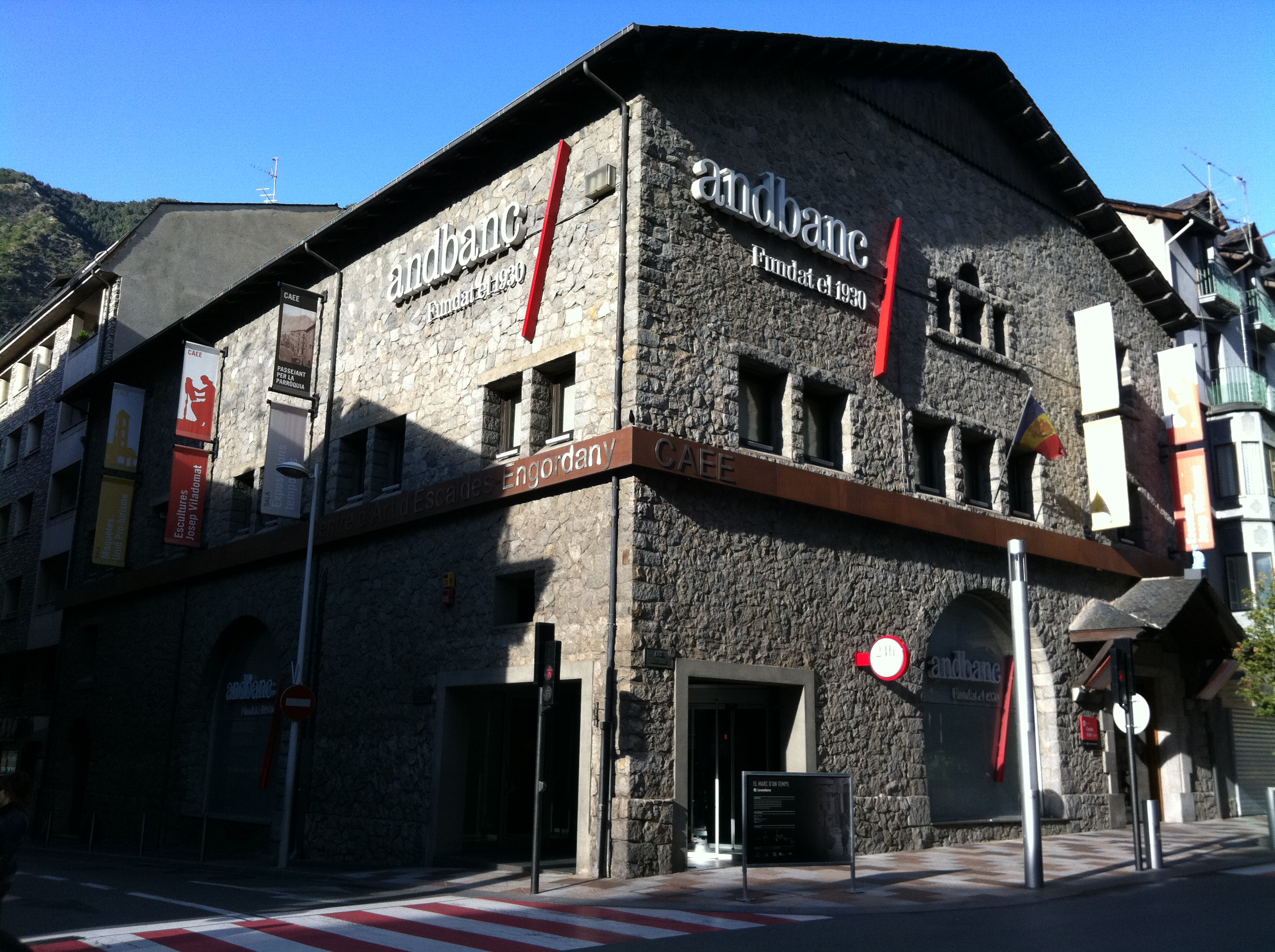 Garatge i cinema Valira